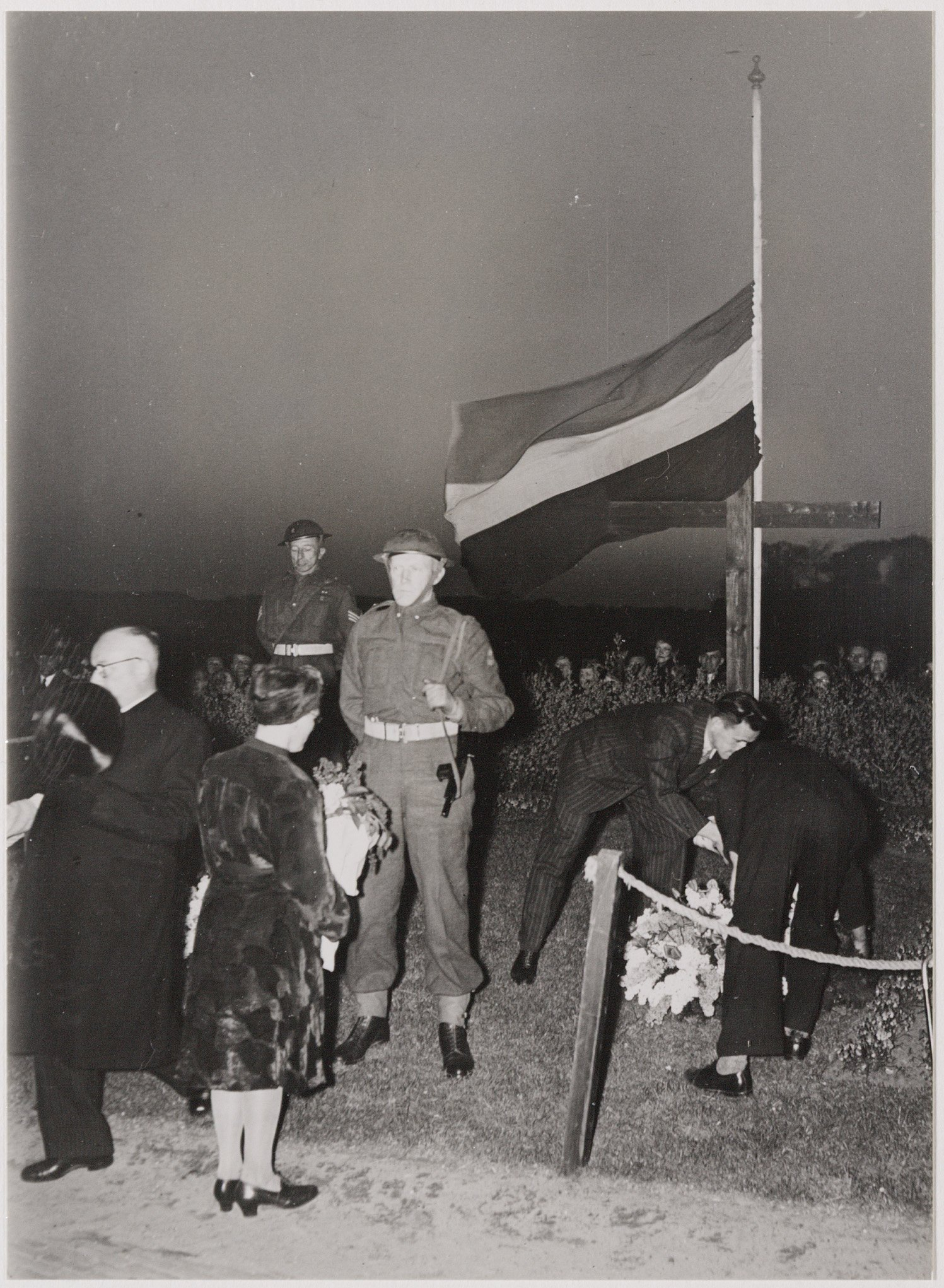 Het voorlopige verzetsmonument aan de Rijksstraatweg ter hoogte van de Jan Gijzenvaart